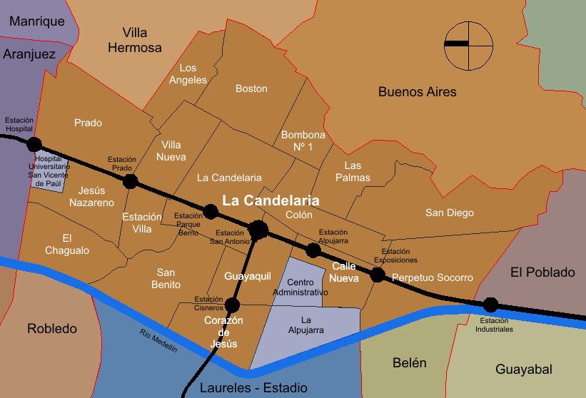 mapa de la división barrial de la comuna La Candelaria. Medellín, Colombia.